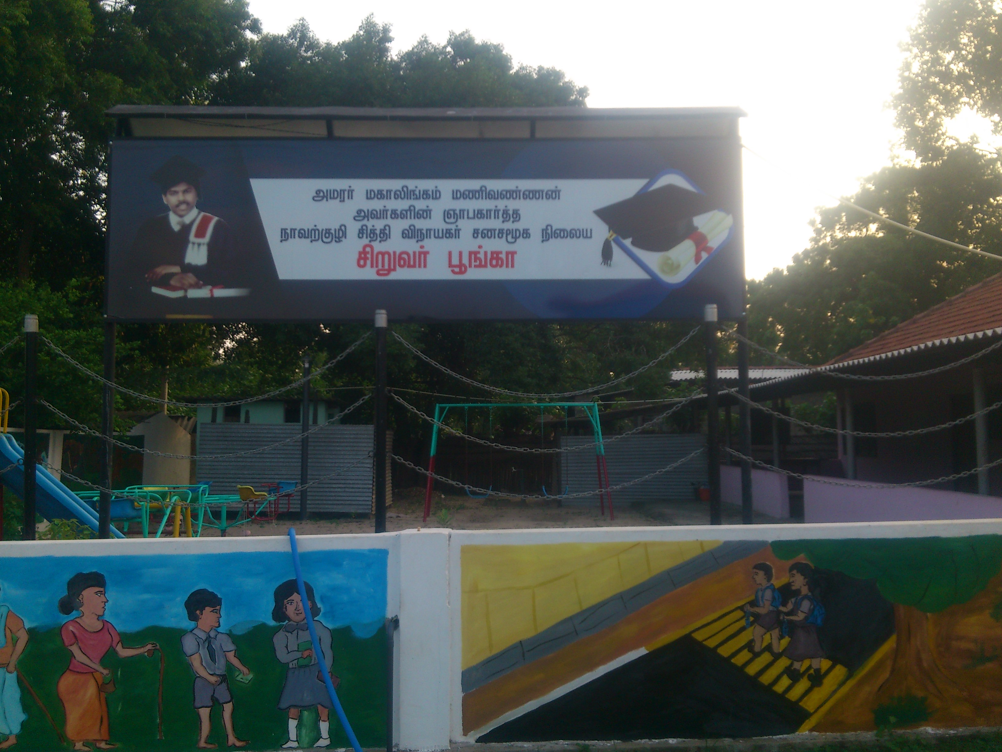 சித்தி விநாயகர் சிறுவர்பூங்கா